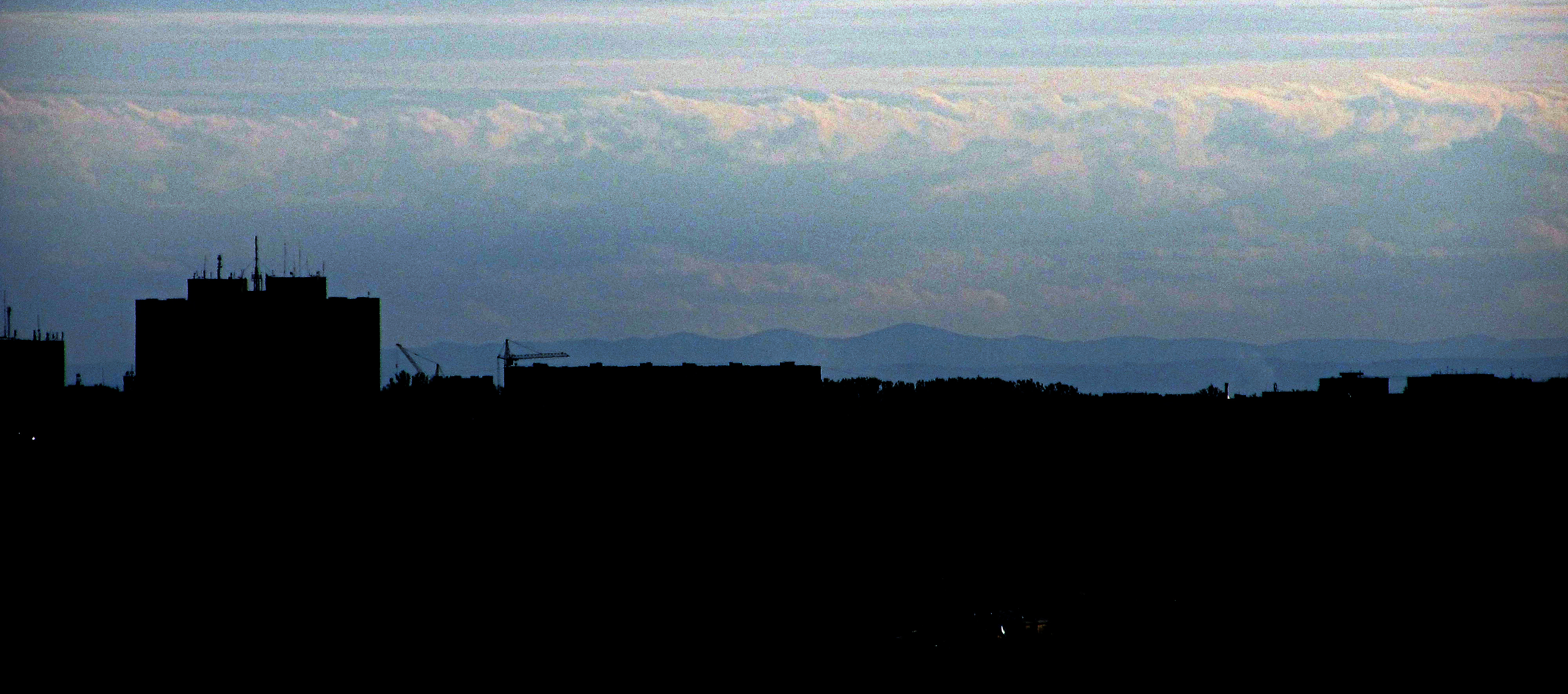 гора Парашка з Львова, на фоні податкової адміністрації